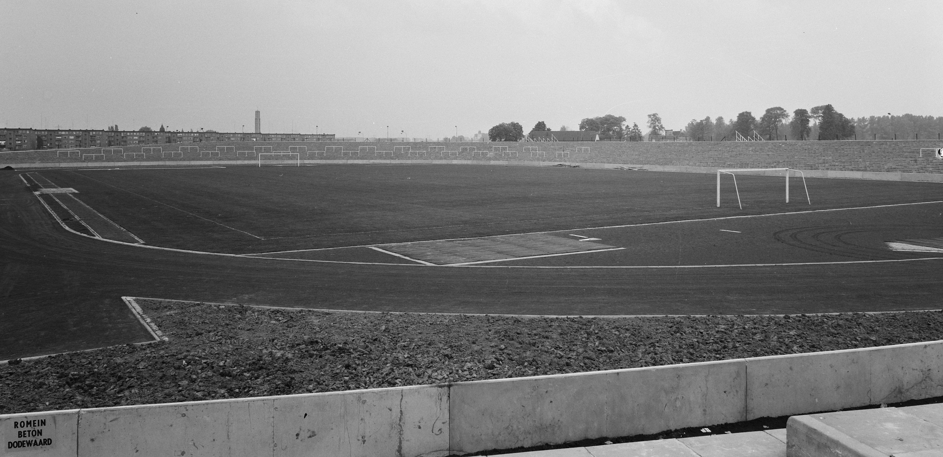 Collectie / Archief : Fotocollectie Nederlandse Heidemaatschappij Reportage / Serie : [ onbekend ] Beschrijving : Het nieuw opgeleverde voetbalstadion De Geusselt Datum : mei 1961 Locatie : Maastricht Trefwoorden : recreatieterreinen, stadions, vliegvelden e.d. Fotograaf : [onbekend] Auteursrechthebbende : Nationaal Archief Materiaalsoort : Negatief (zwart/wit) Nummer archiefinventaris : bekijk toegang 2.24.06.02 Bestanddeelnummer : 163-0958